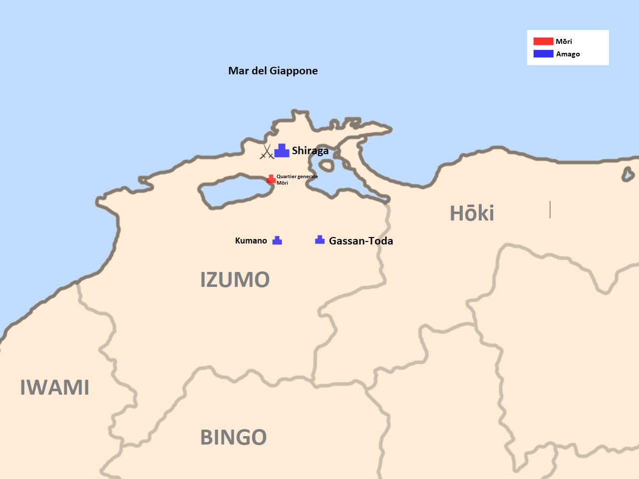 Assedio di shigara